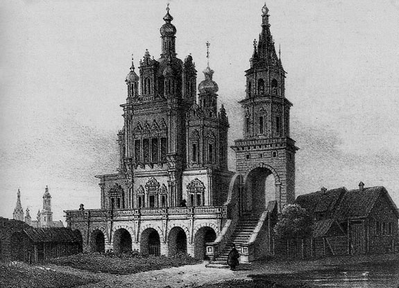 Церковь Успения Пресвятой Богородицы на Покровке